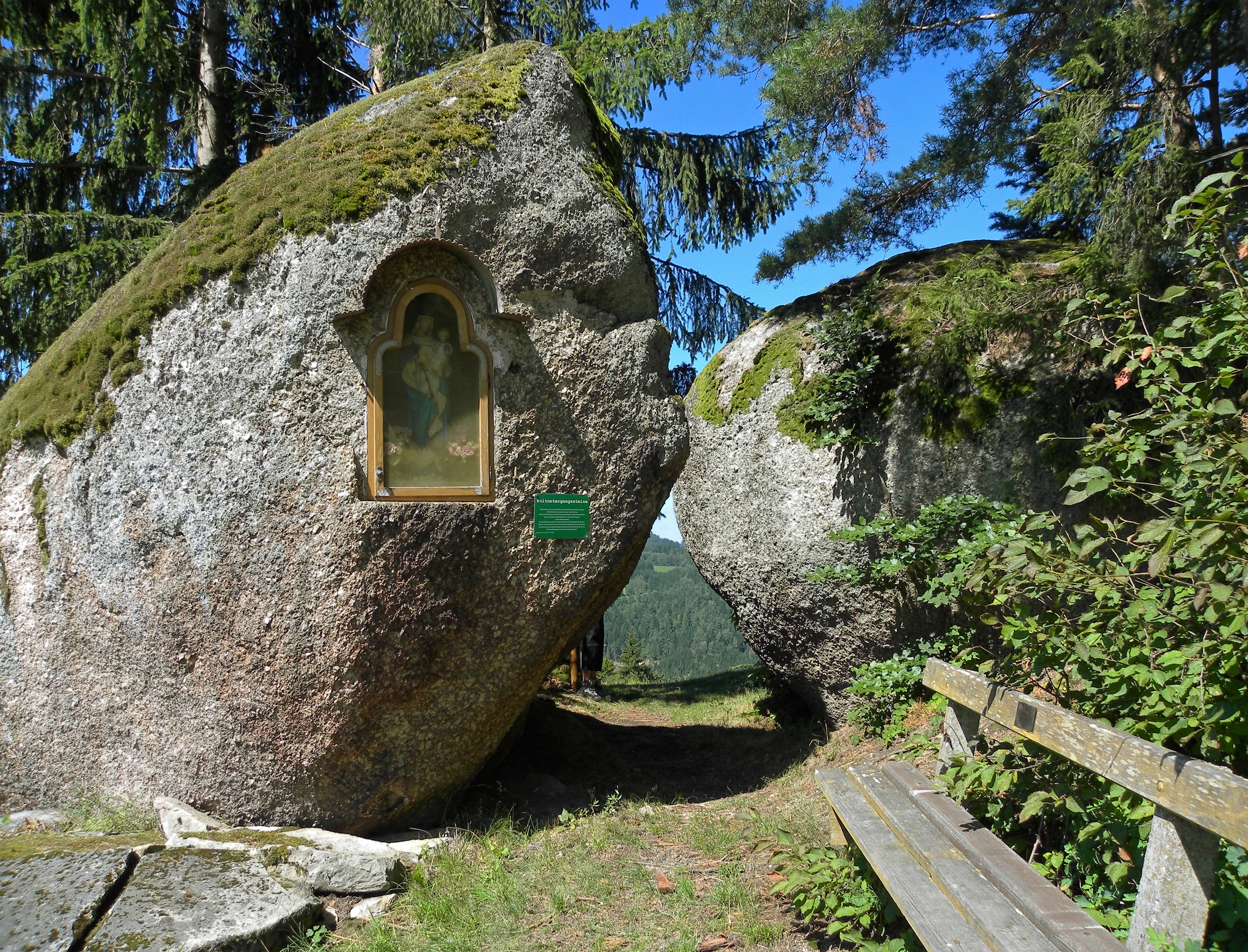 Obwohl die Bauern früher mit dem Heuwagen zwischen den beiden Steinen durchgefahren sind, ist heute nur mehr ein schmaler Fußweg vorhanden. Der nördliche (rechte) der beiden Findlinge bewegt sich nämlich stetig auf den anderen zu. Der Legende nach soll die Welt untergehen, sobald sich die beiden Findlinge berühren. In der am linken Stein angebrachten Nische befindet sich eine Madonna, die 1917 zu Fuß von Pöstlingberg nach St. Leonhard getragen wurde.